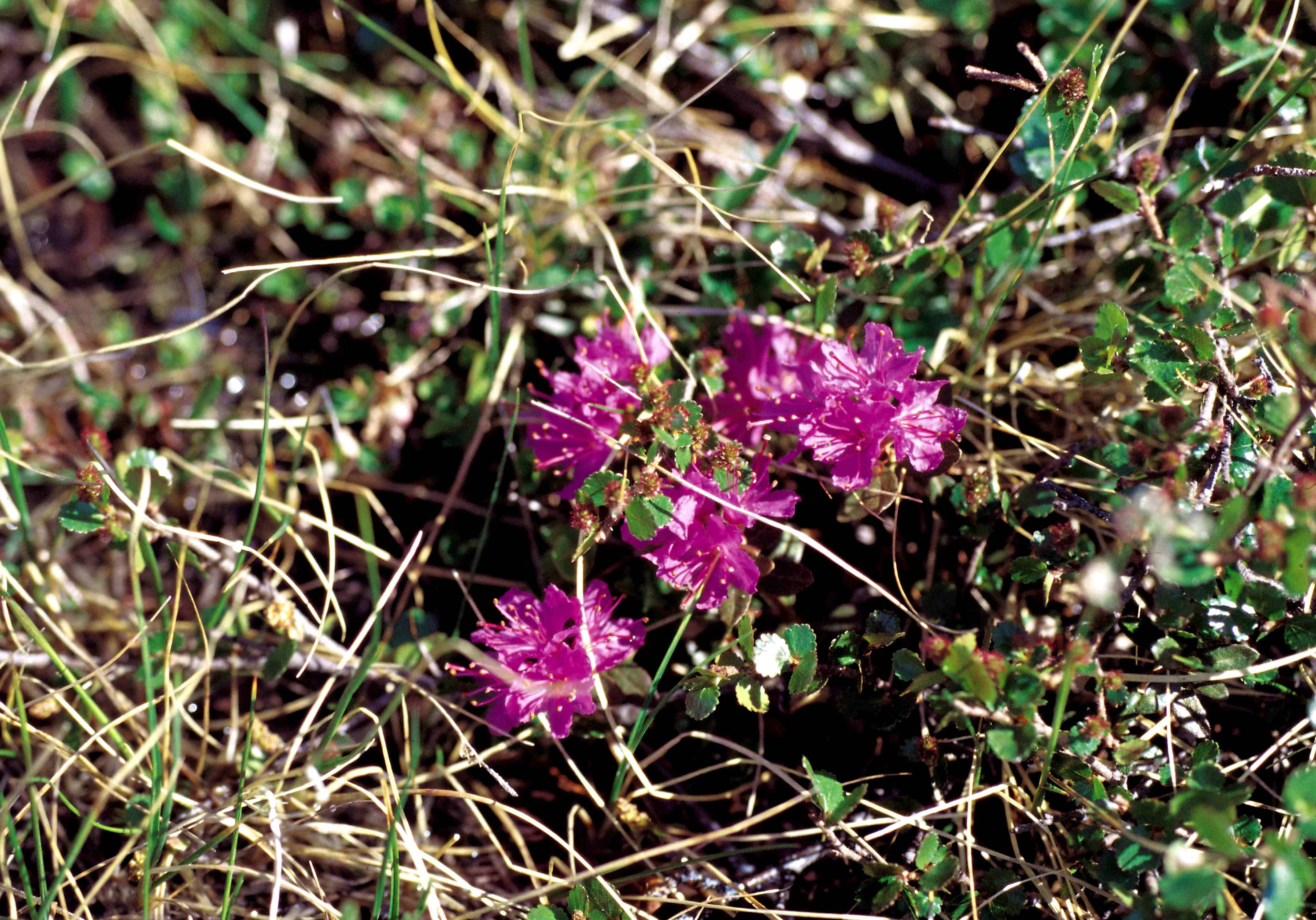 Lapland rose-bay near Wager Bay (Ukkusiksalik National Park, Nunavut, Canada)